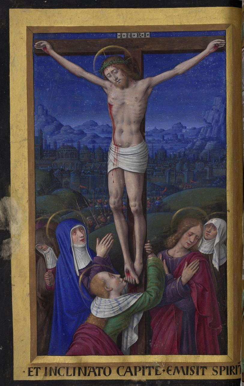 Fol. 47v - Crucifixion